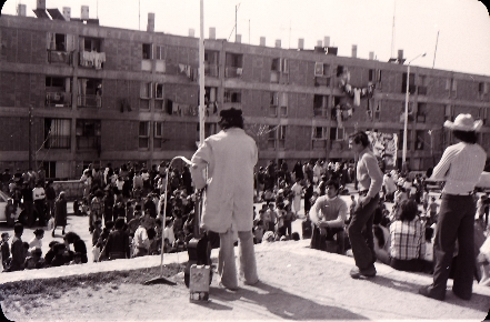 צילום של ימין מסיקה, מתוך פעילות של תנועת האוהלים בשכונת קטמון ט' ירושלים